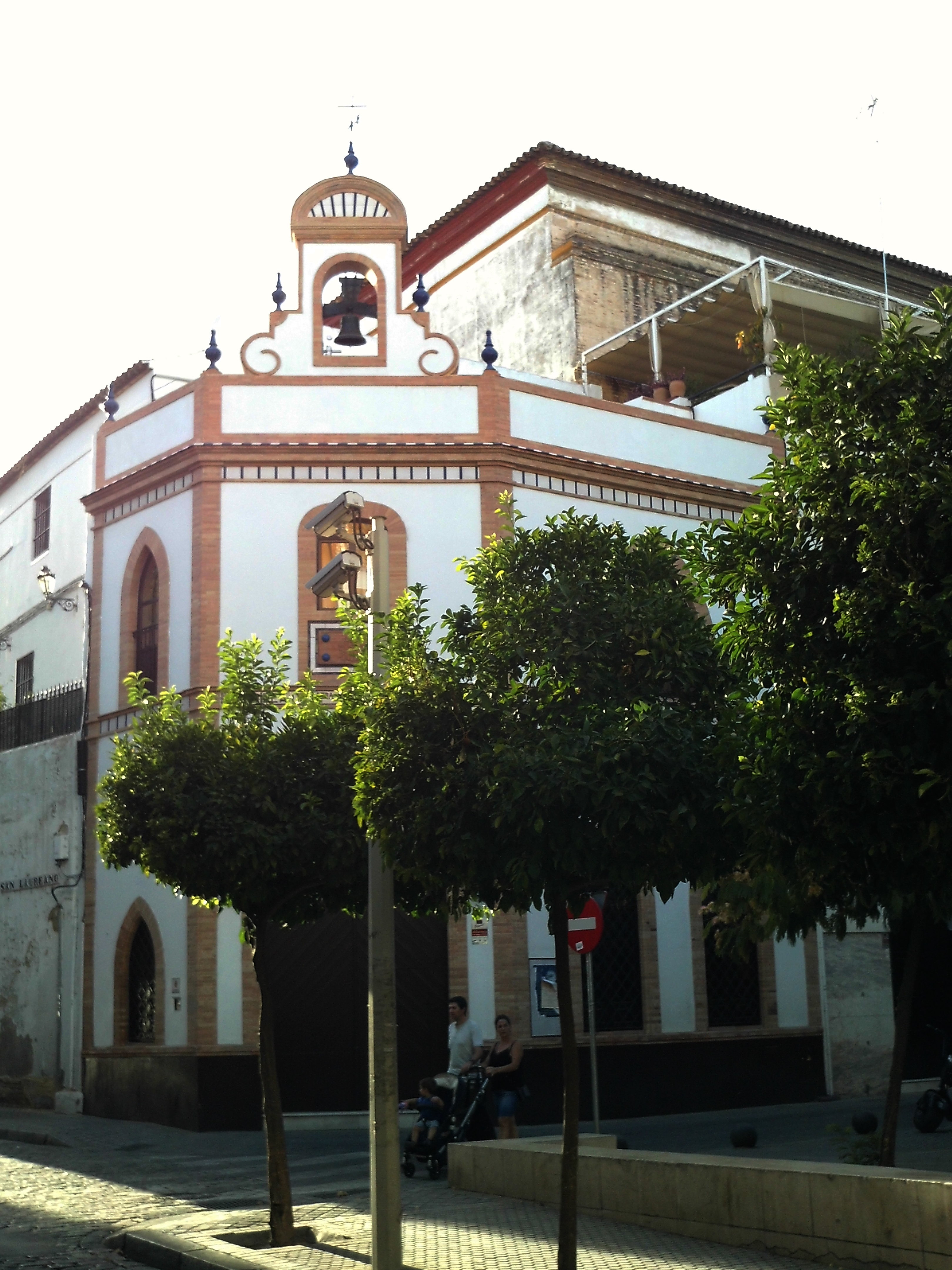 Capilla de Nuestra Señora de las Mercedes. Plaza de la Puerta Real. Sevilla, Andalucía, España.